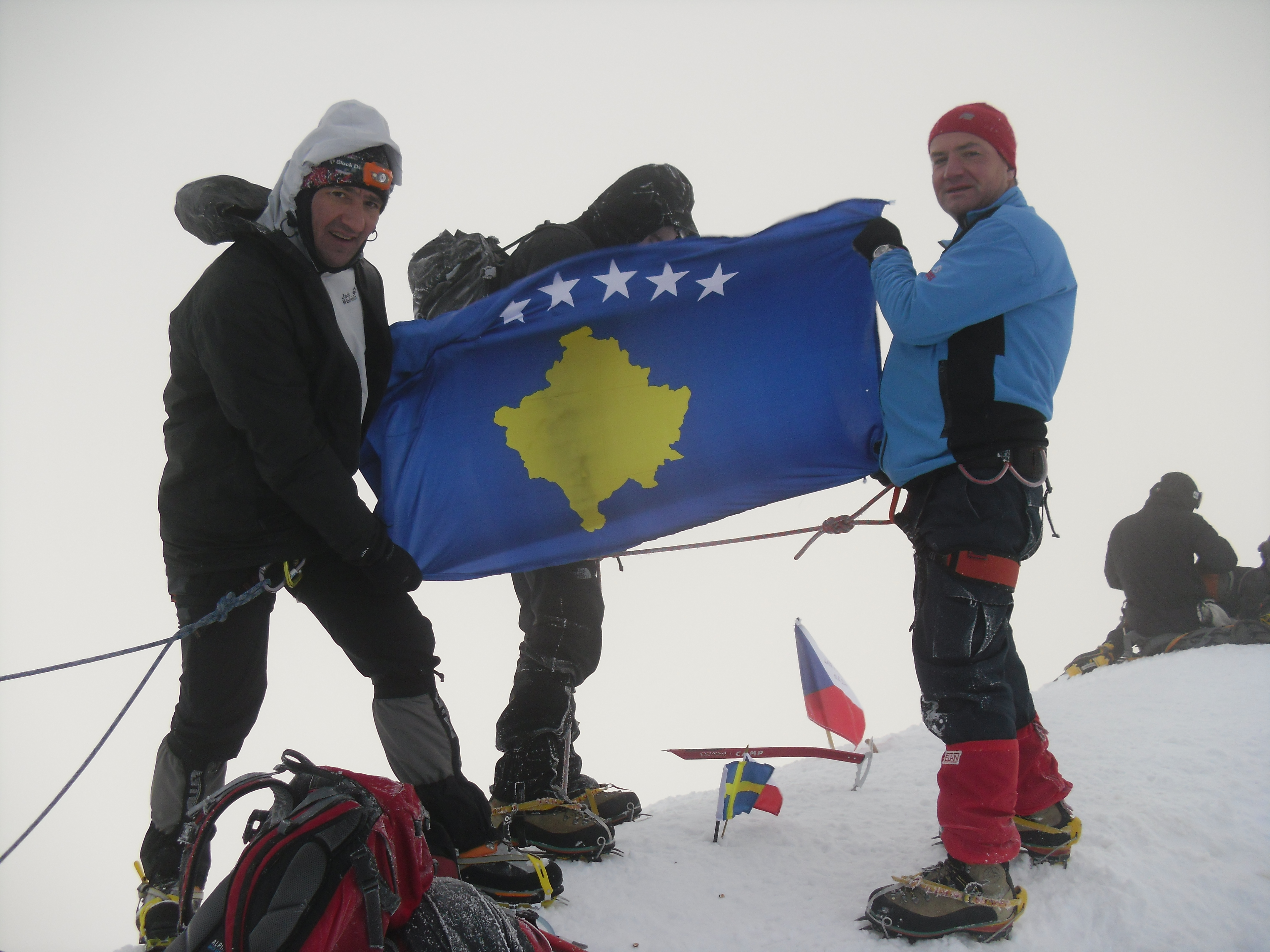 Në plan të parë: Abdurahim Abdushi, bjeshkatarë i SHB "Sharri" Prizren Koha: 2011-08-18 Vendi: Mont Blanc_ 4.810m lmd, Mont Blanc Group, West Alps, F/I (Maja më e lartë e Alpeve)